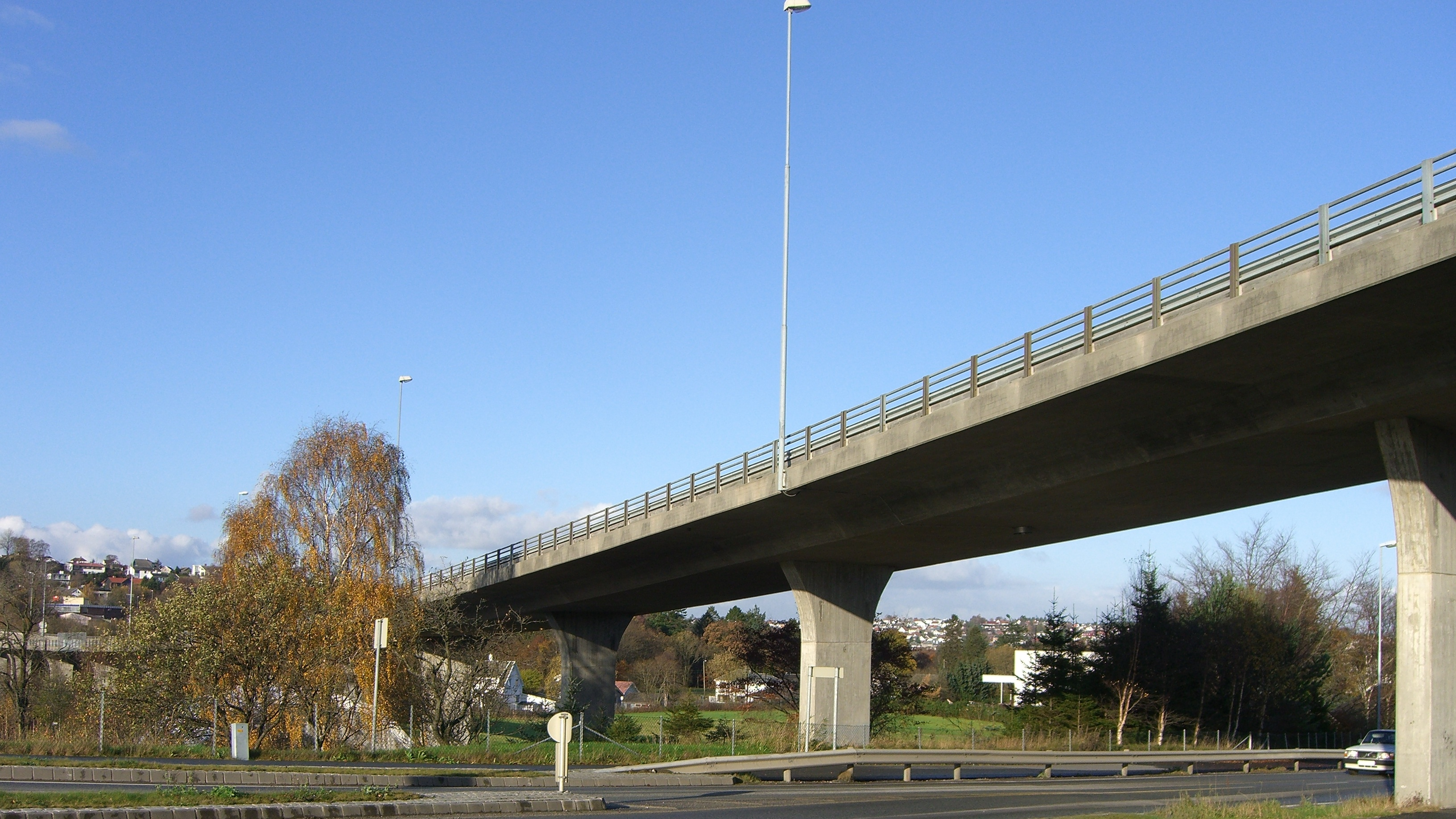 Kvelluren bru in Sandnes, Norway